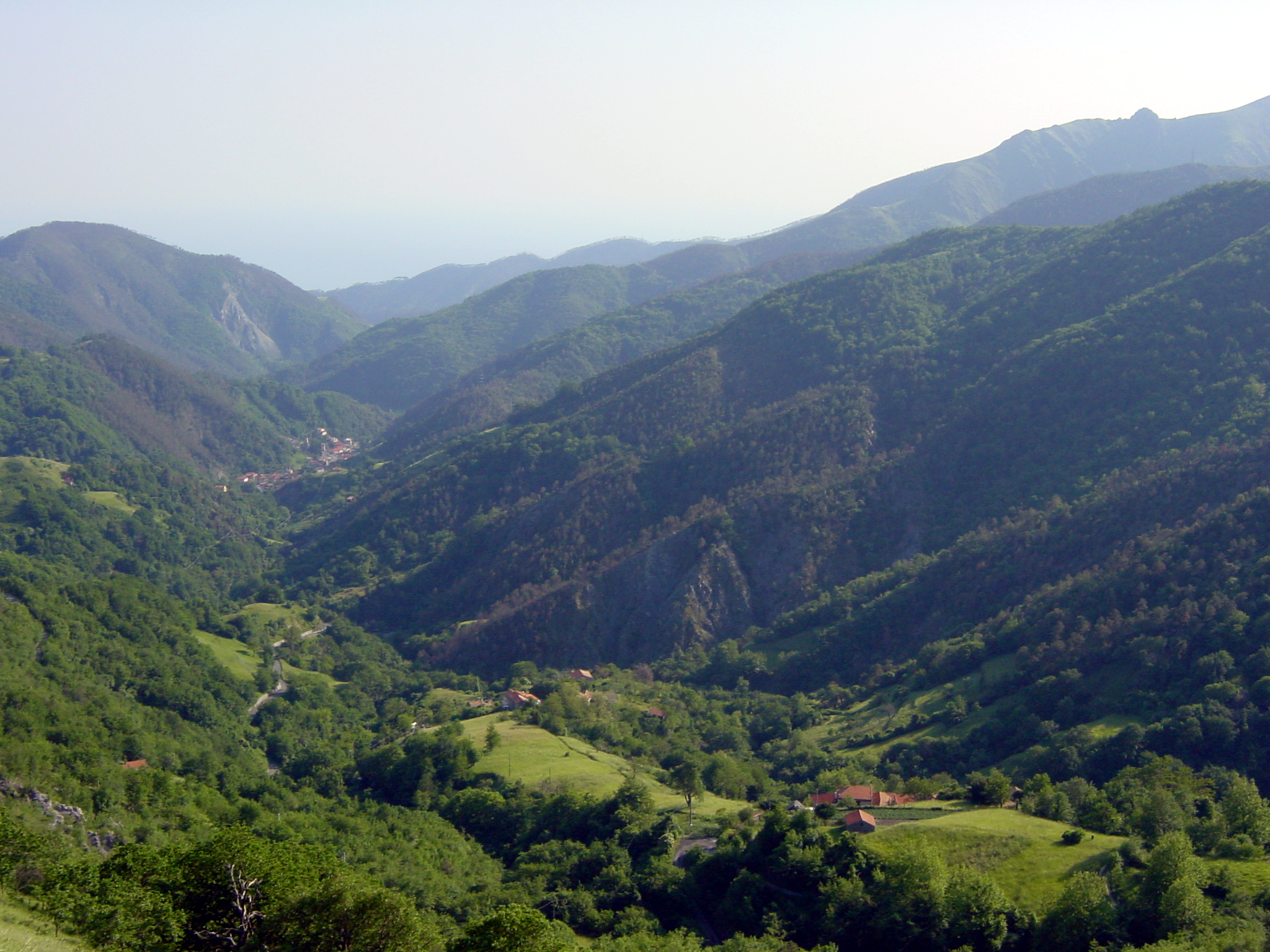 Val Varenna